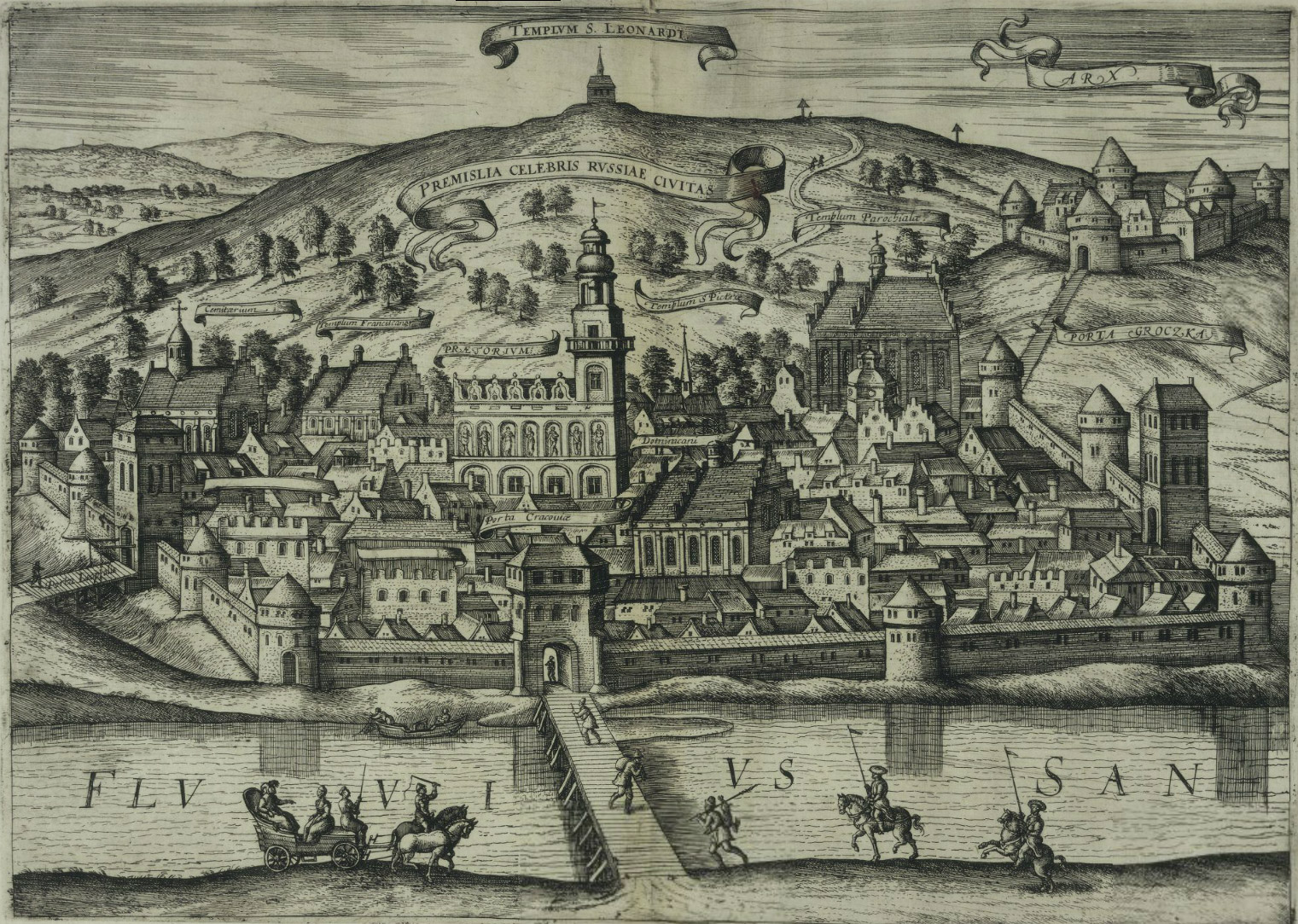 План "Premislia celebris Rvssiae civitas".